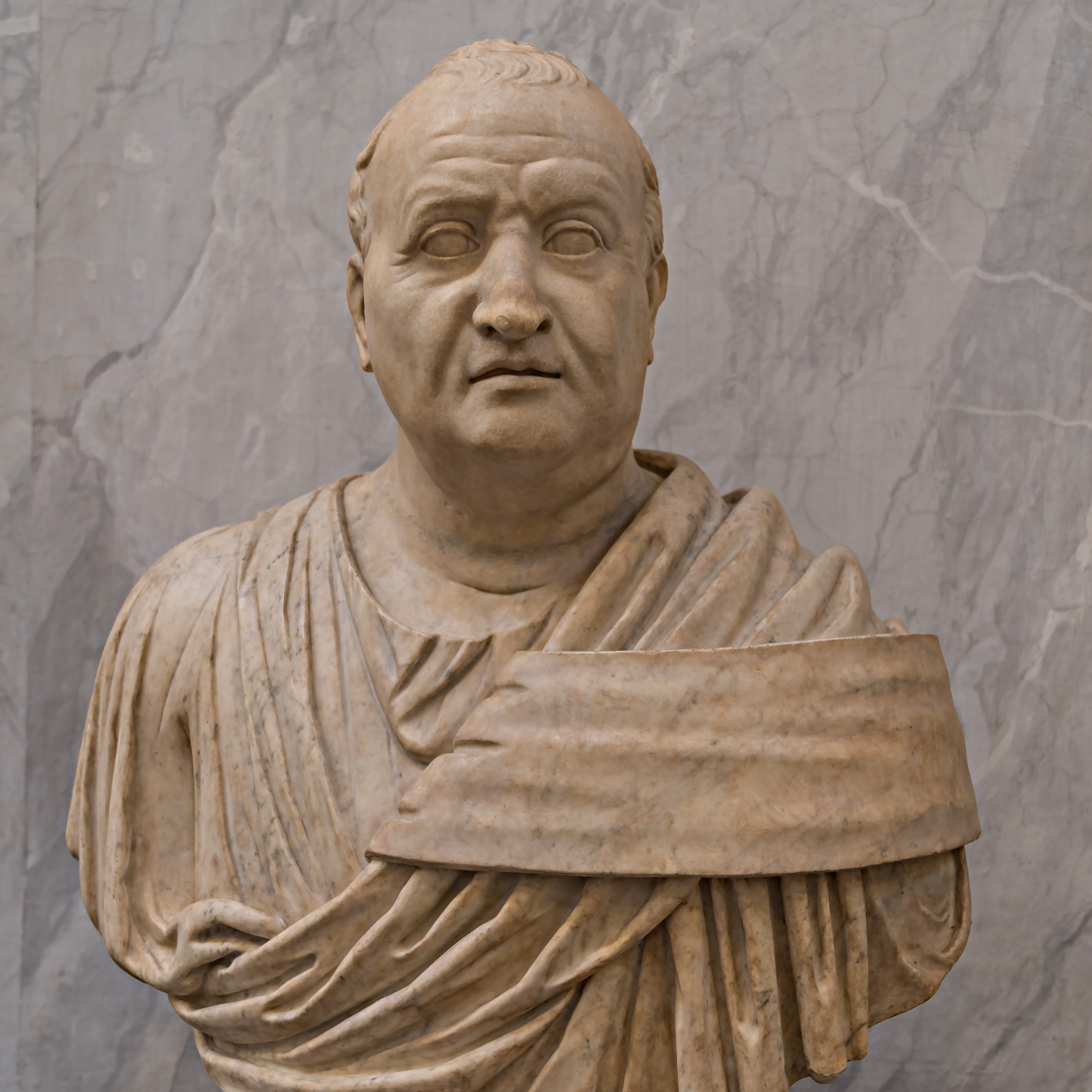 Gnaeus Domitius Ahenobarbus, Vater von Kaiser Nero, ausgestellt in den Vatikanischen Museen (überarbeitete Büste, Inv. 2222)